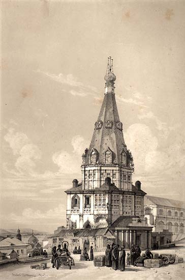 Никольская церковь в Гостином дворе. Литография из альбома Андре Дюрана.